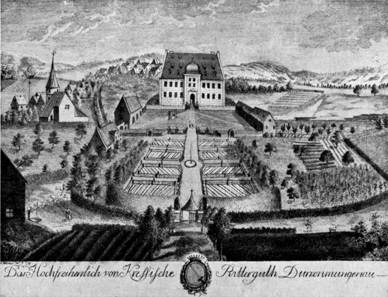 Kupferstich, Das Hochfreiherrlich von Kressische Ritterguth Dürrenmungenau